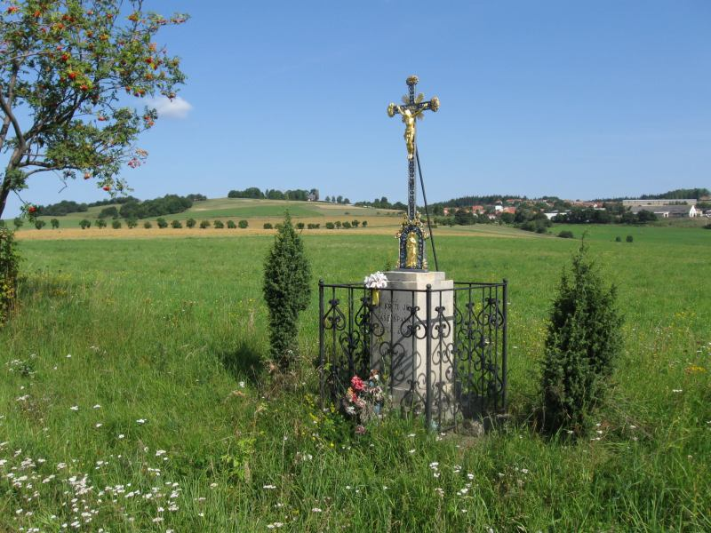 Česky: Kříž u Šošůvky, v pozadí Šošůvka